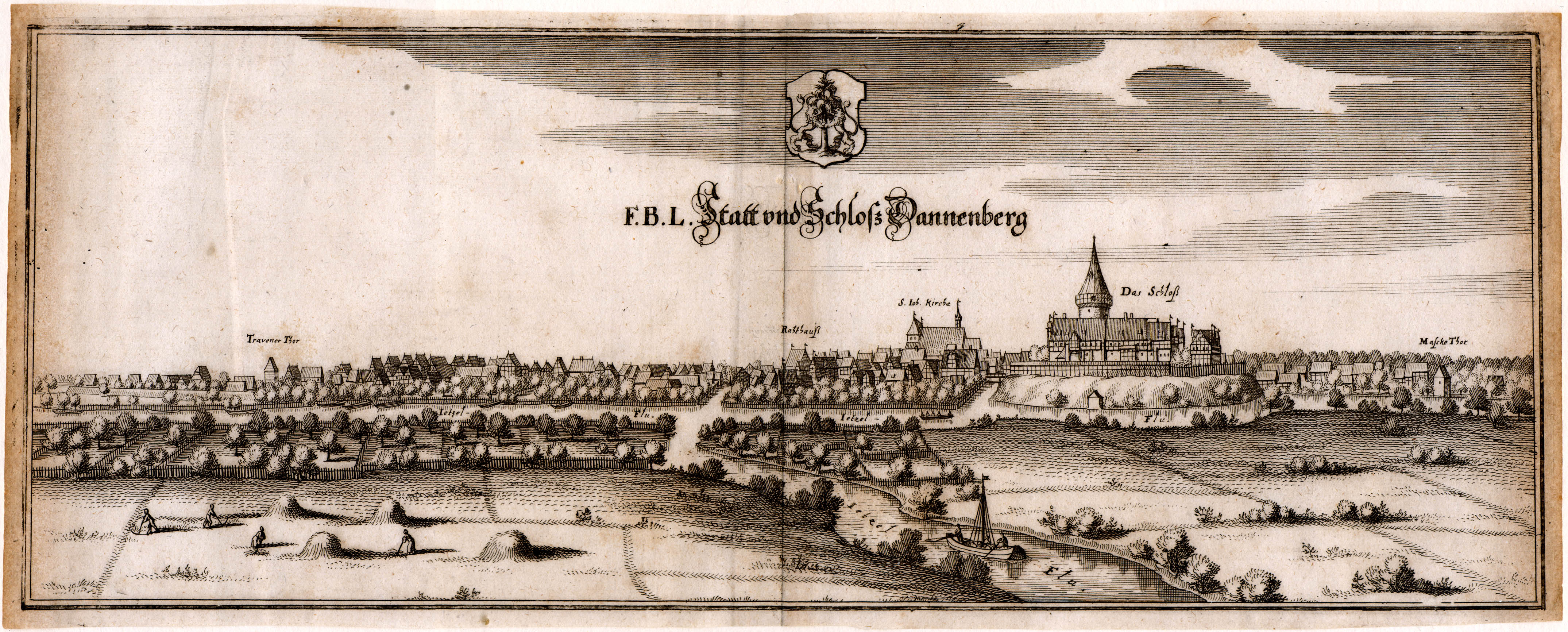 Matthäus Merian: Dannenberg (Elbe), engraving, 1645